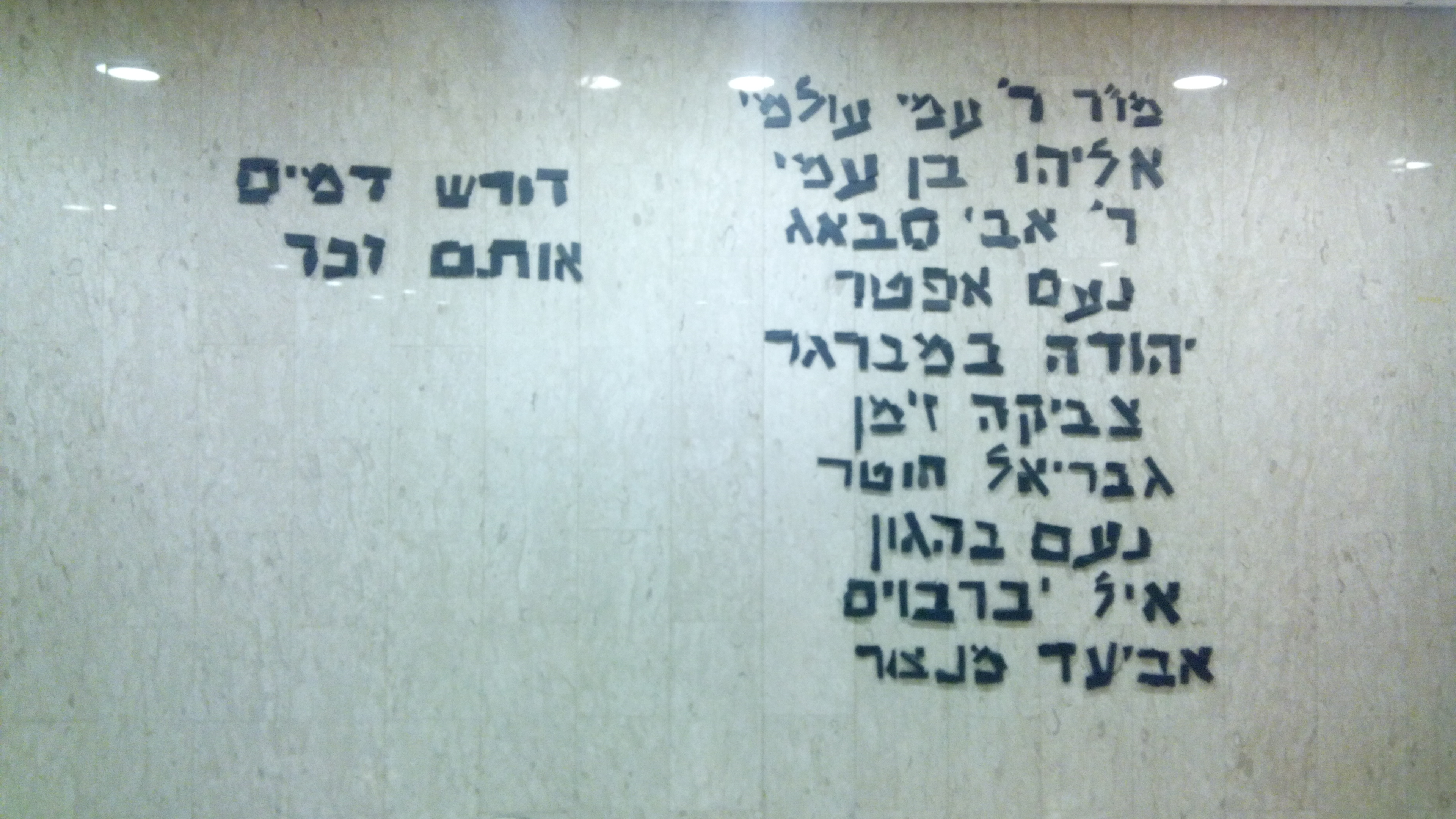 קיר הזיכרון במבואת הישיבה